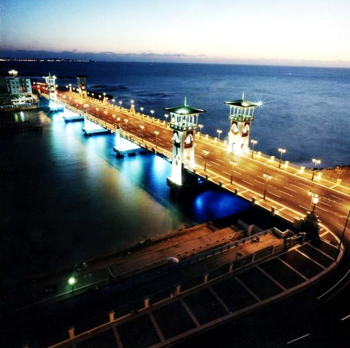 كوبري ستانلي عام 2002